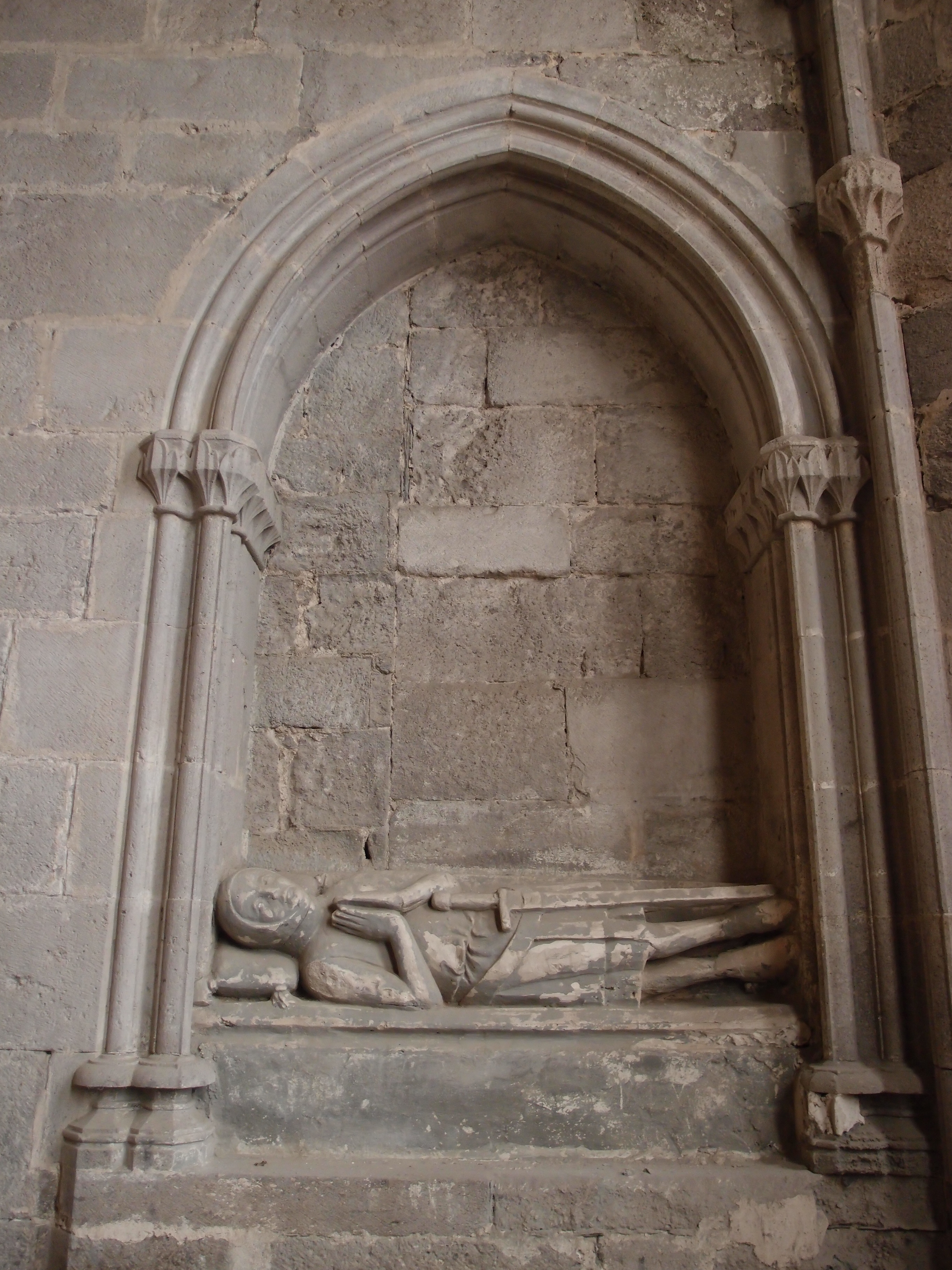 Grabmal eines Ritters in einer Rüstung des 13. Jahrhunderts in der Basílica de Santa María von Castelló d’Empúries (Katalonien/Spanien)